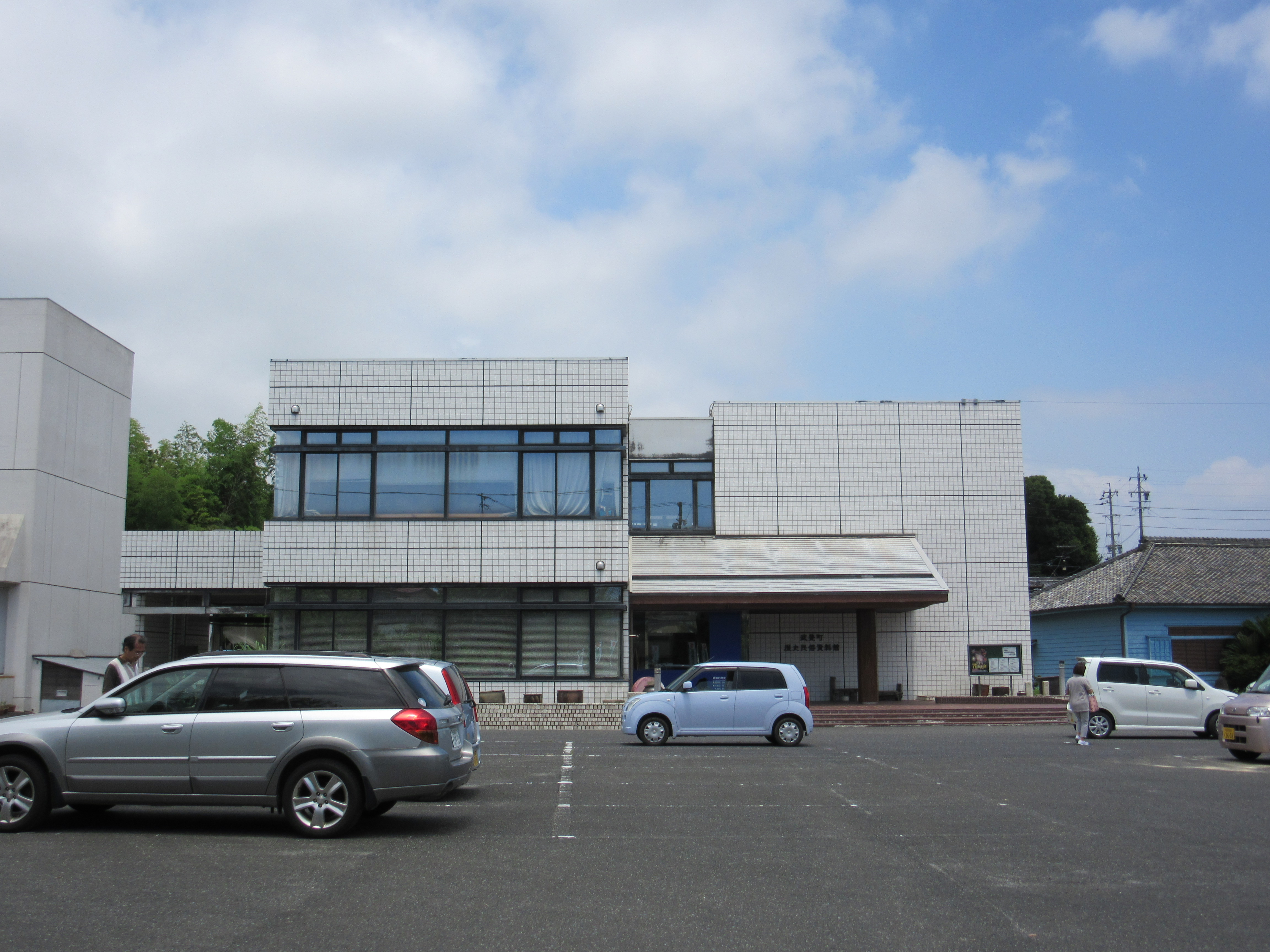 武豊町歴史民俗資料館